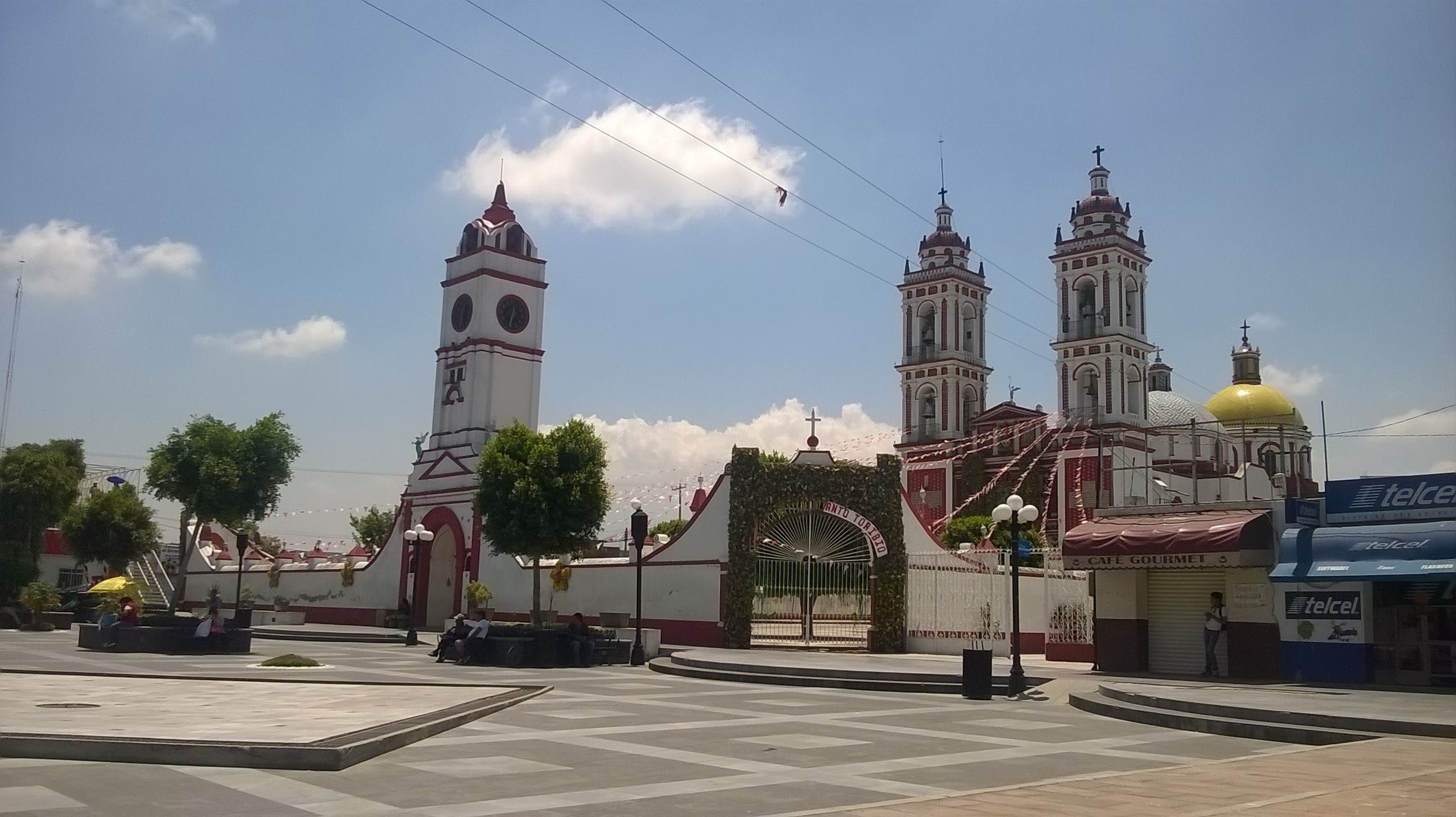 Parroquia de Santo Toribio, Xicohtzinco, Tlaxcala